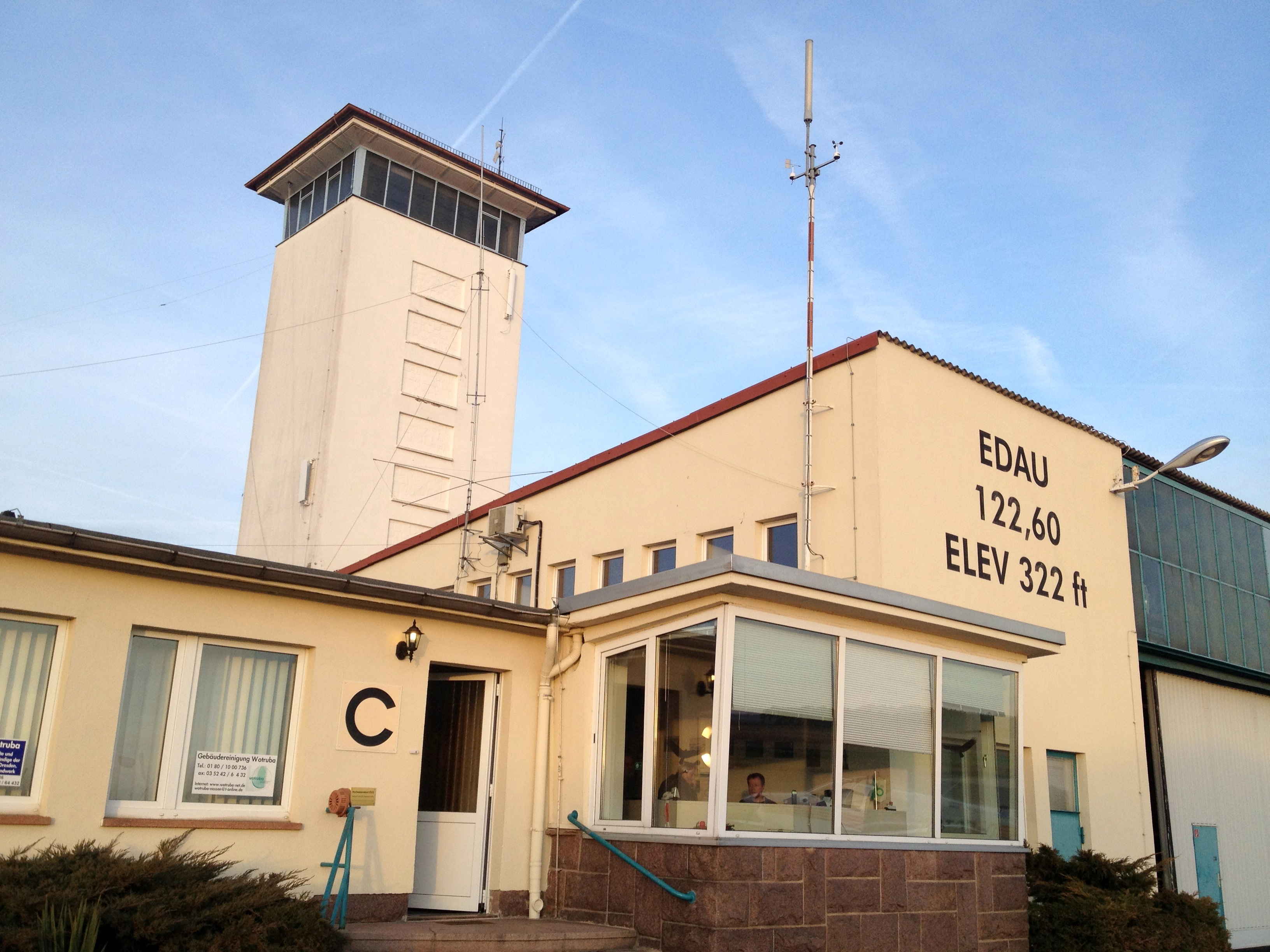 Dies ist das Gebäude, in dem sich der Flugleiter des Flugplatzes Riesa-Göhlis befindet.